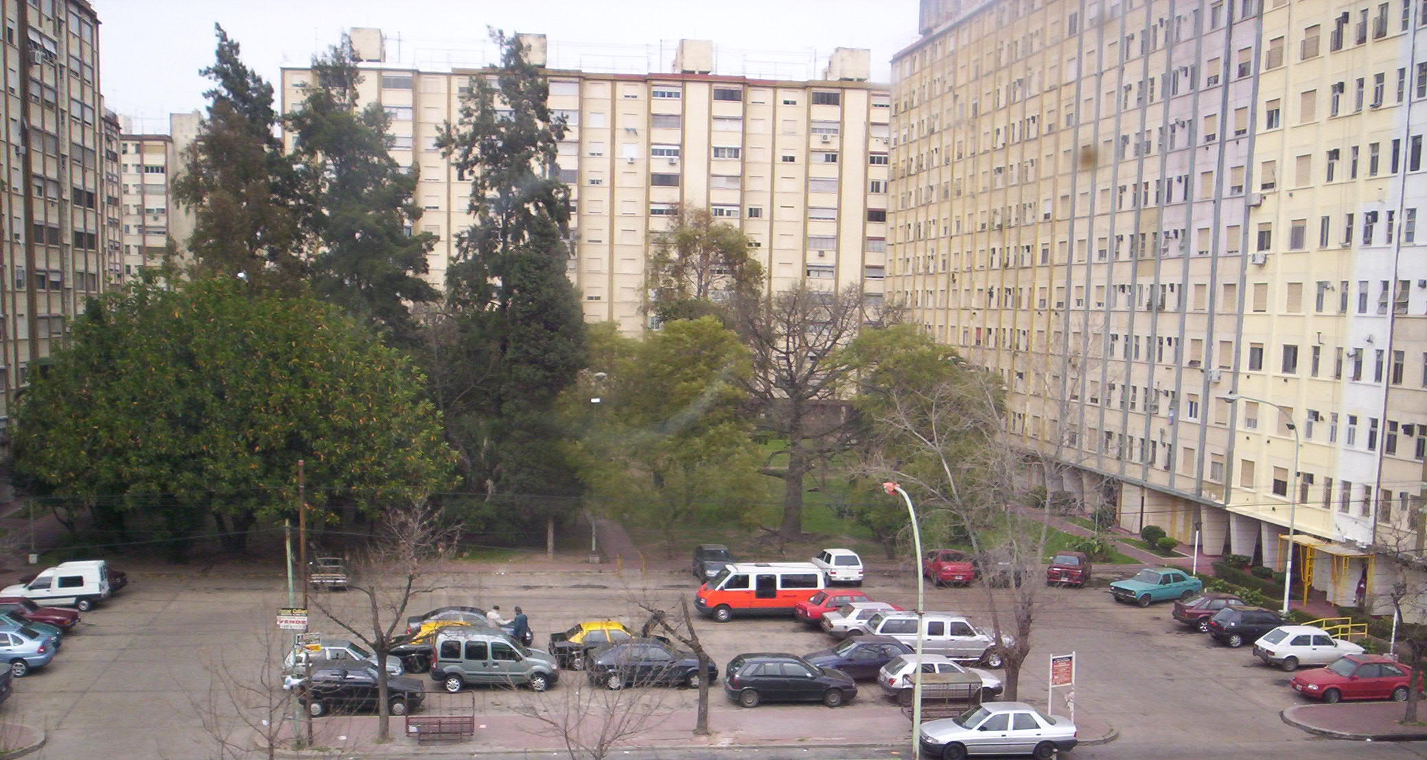 Barrio J.J. Nágera. Complejo de edificios tipo Monoblocks, una construcción muy difundida en el Barrio de Villa Lugano, Ciudad de Buenos Aires, Argentina.